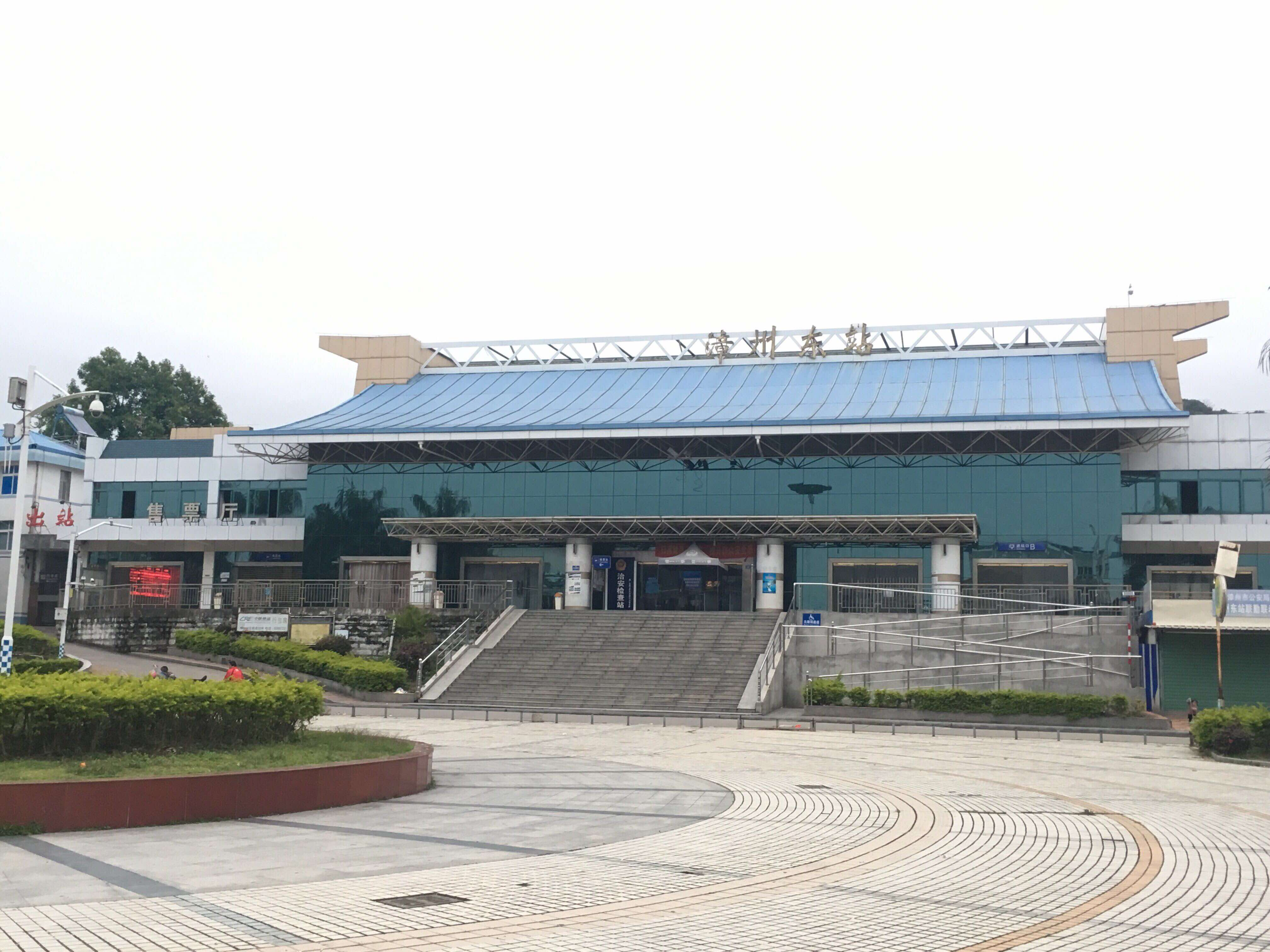 漳州东站{原郭坑站}